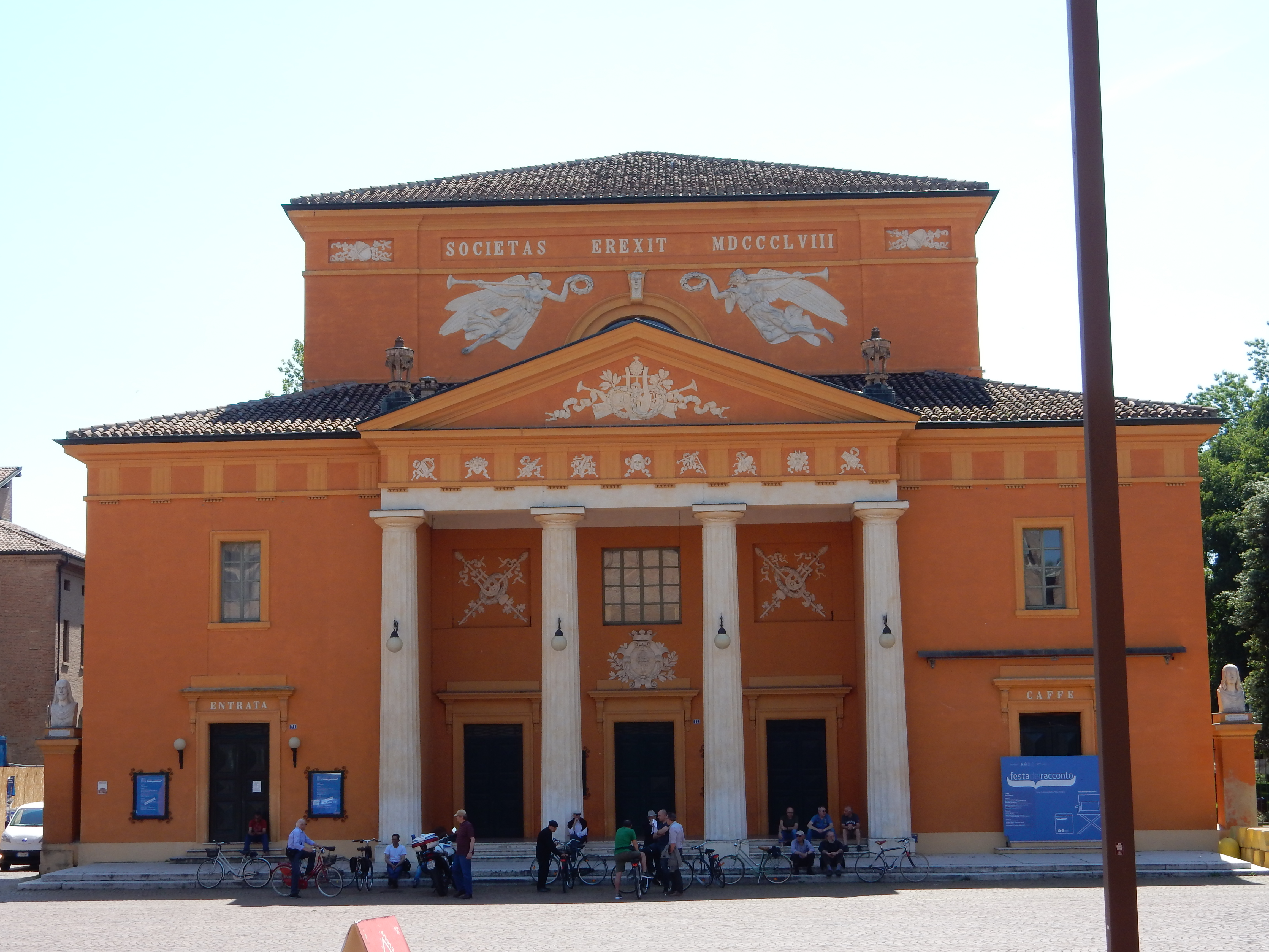 Facciata del Teatro Civico